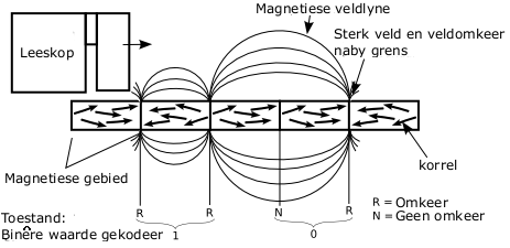 Die magnetiese oppervlak en sy werking. In hierdie geval vind die enkodering van die binêre data deur middel van frekwensie modulasie plaas.